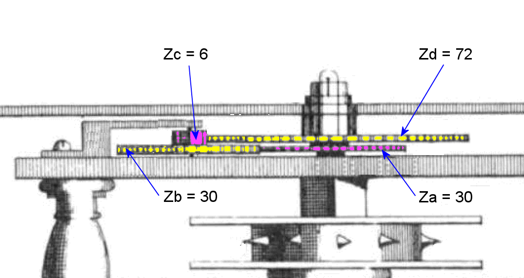 Détail de la minuterie dans la "Huygens clock" avec mise en évidence des nombres de dents pour déterminer le rapport de transmission entre le movement de l'aiguille des minutes et celle des heures.